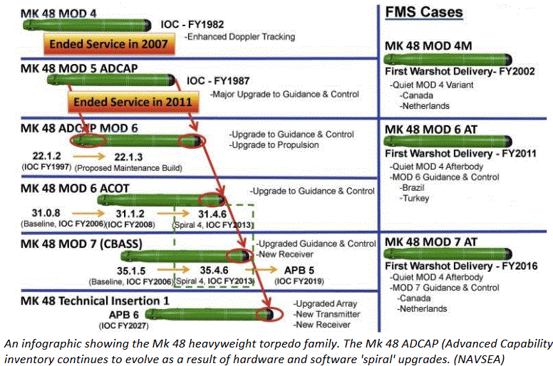 Évolution des modèles de la torpille Mark 48.